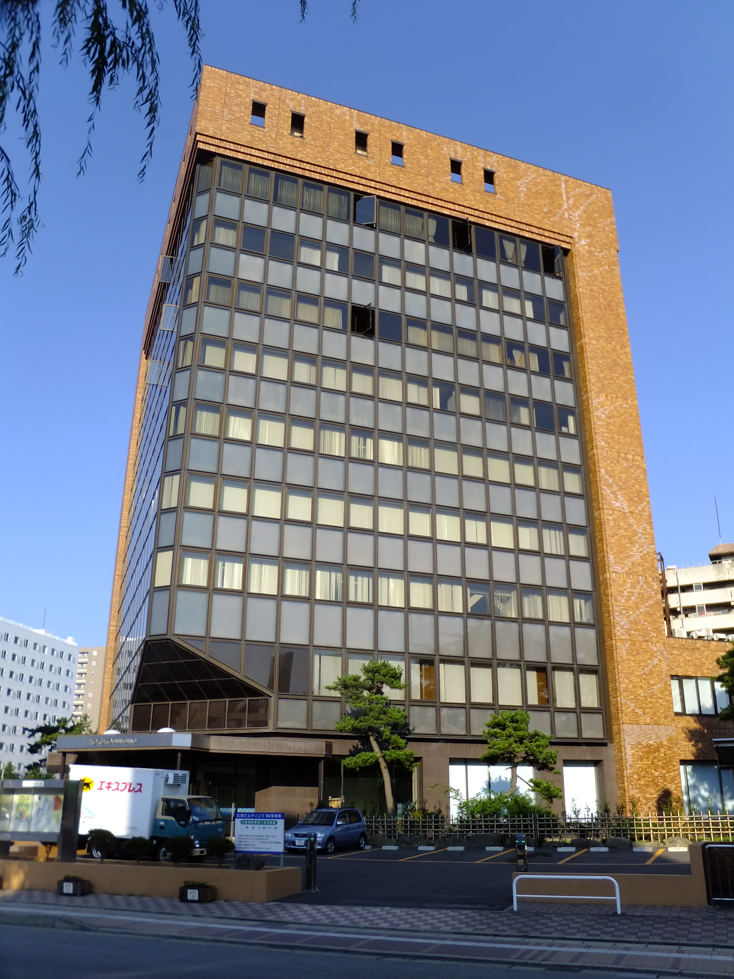 秋田市中通にある北都ビルディング。もとは秋田あけぼの銀行(1993年に羽後銀行と合併。羽後銀行を存続行として北都銀行となった)の本店であったが、現在は賃貸オフィスビルとして日本政策金融公庫秋田支店などが入居している。